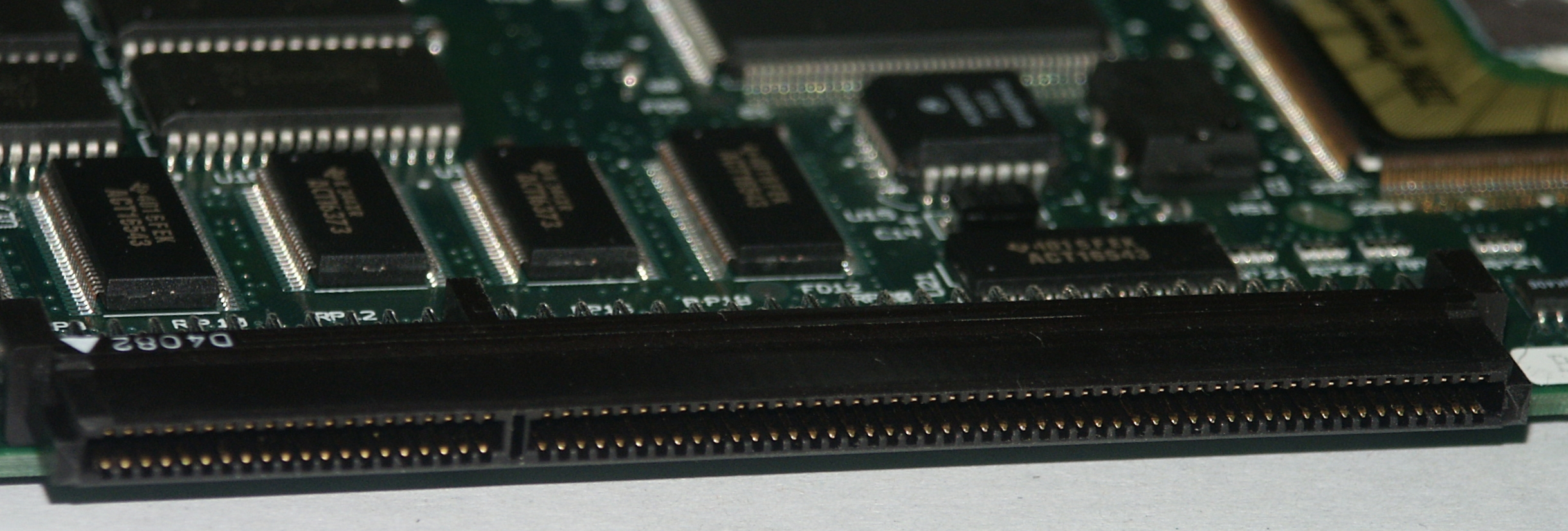 Die PDS auf einer Erweiterungskarte